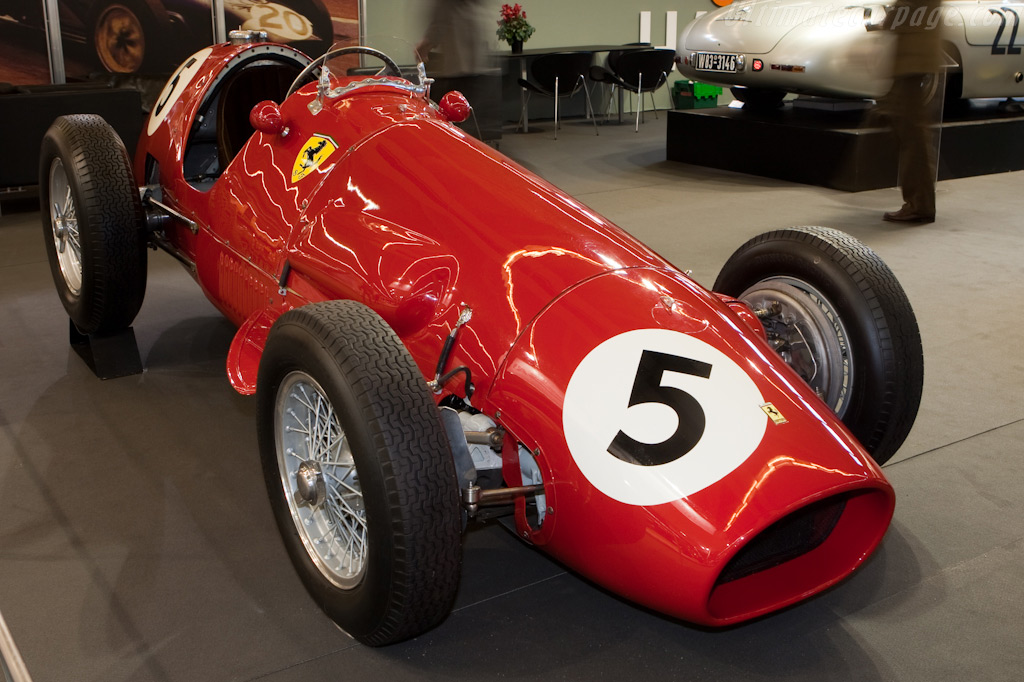 Es un coche de Ferrari